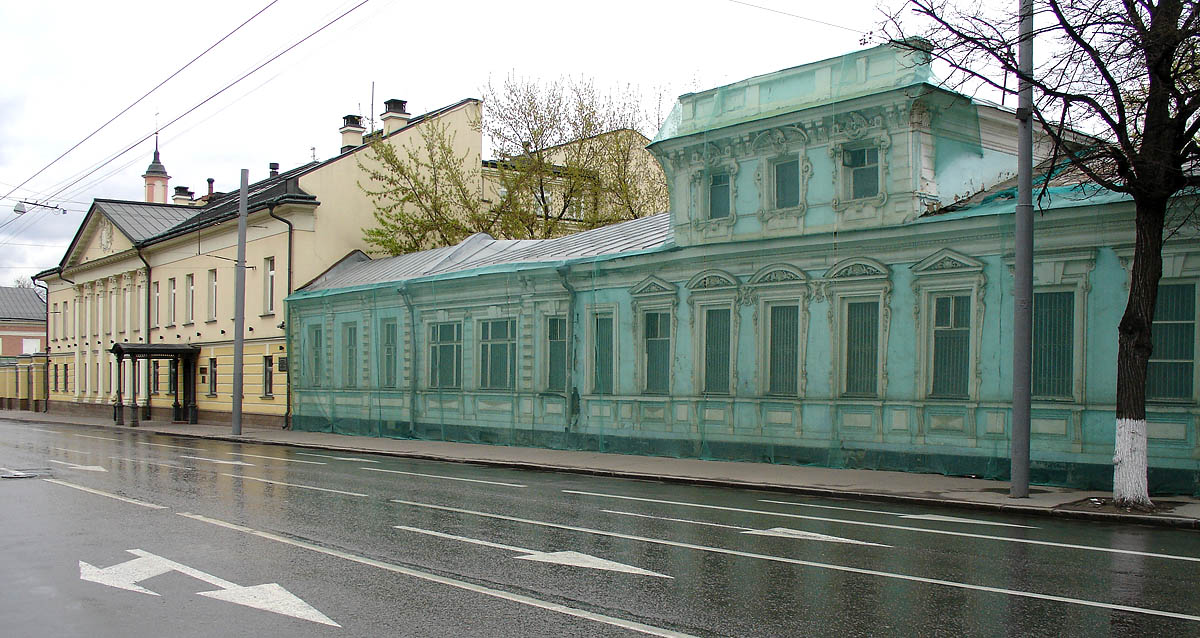 Mindovsky House, 43 Bolshaya Ordynka, Moscow